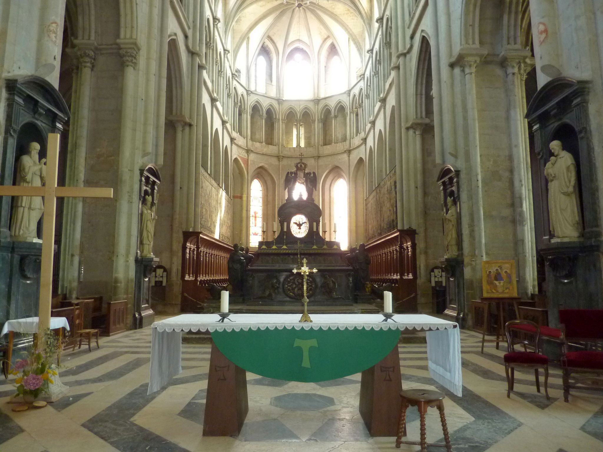 Intérieur de l'abbatiale de Saint-Antoine-l'Abbaye